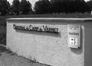 camp internament Vernet d'Ariège